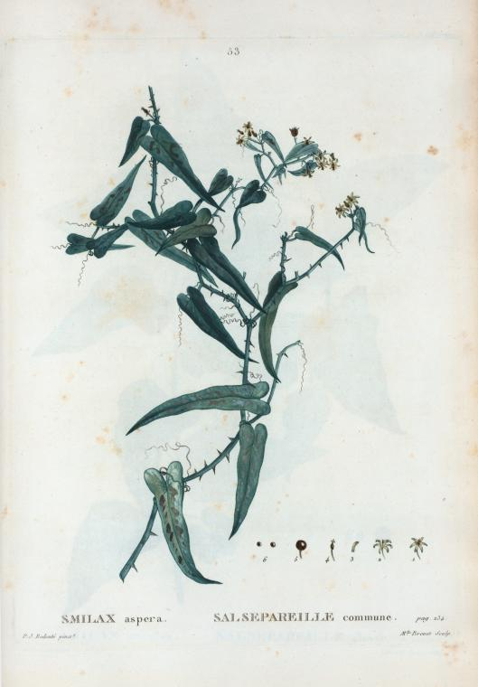 Smilax aspera = Salsepareille commune.